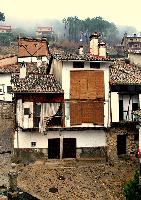 Plaza de la Fuente. Guisando. Ávila. España / Spain.